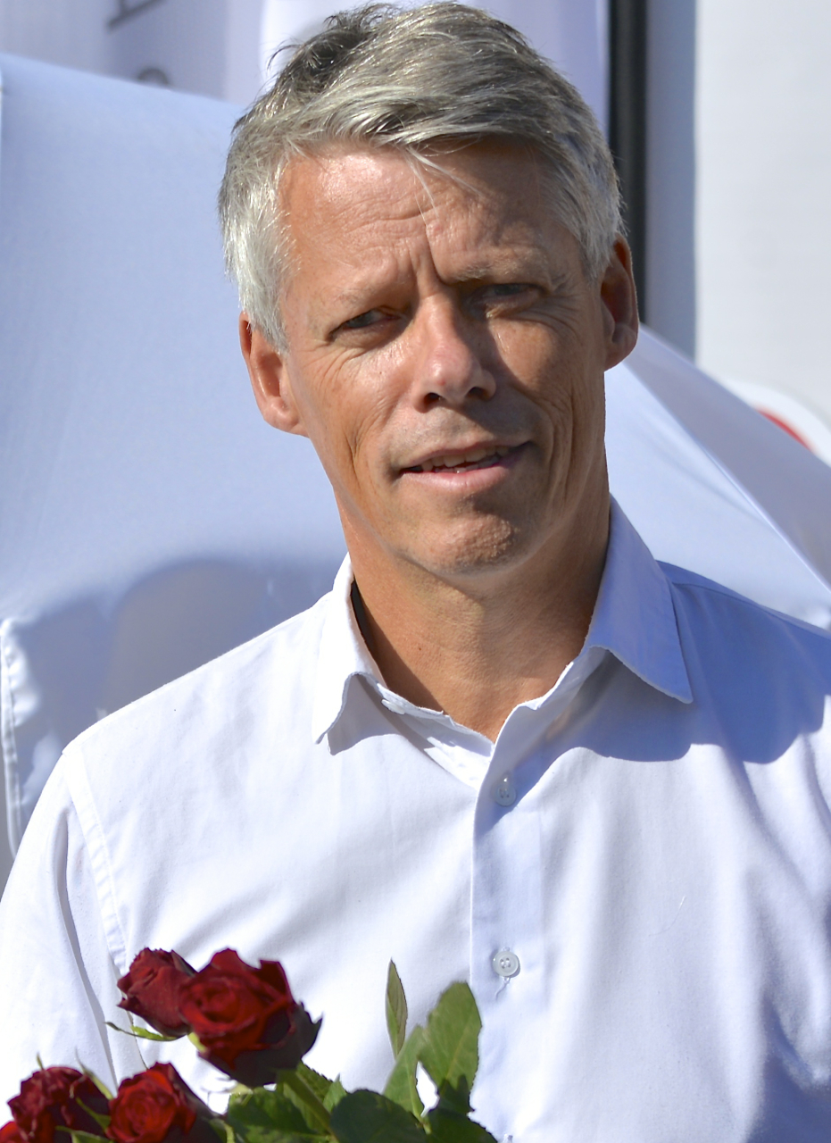 Jens Orback i valrörelsen 2014.